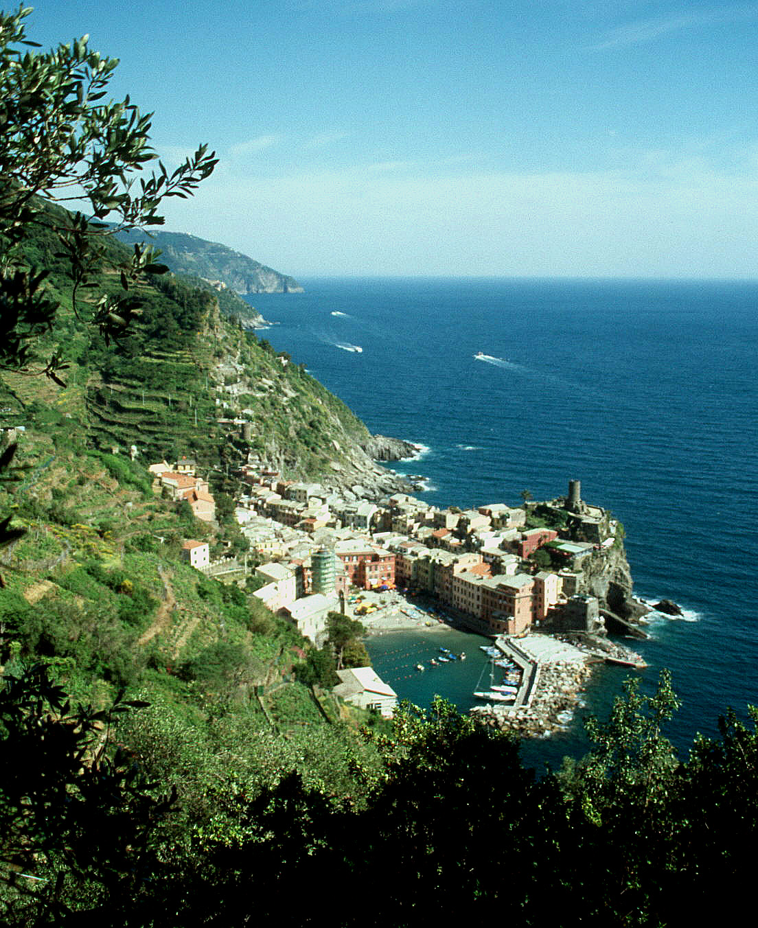 Vernazza 2004